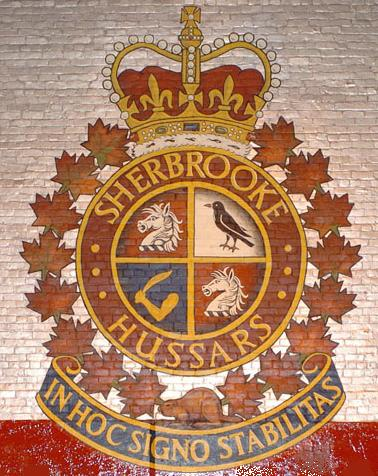 Photographie de l'insigne sur le mur à l'intérieur du Régiment The Sherbrooke Hussars